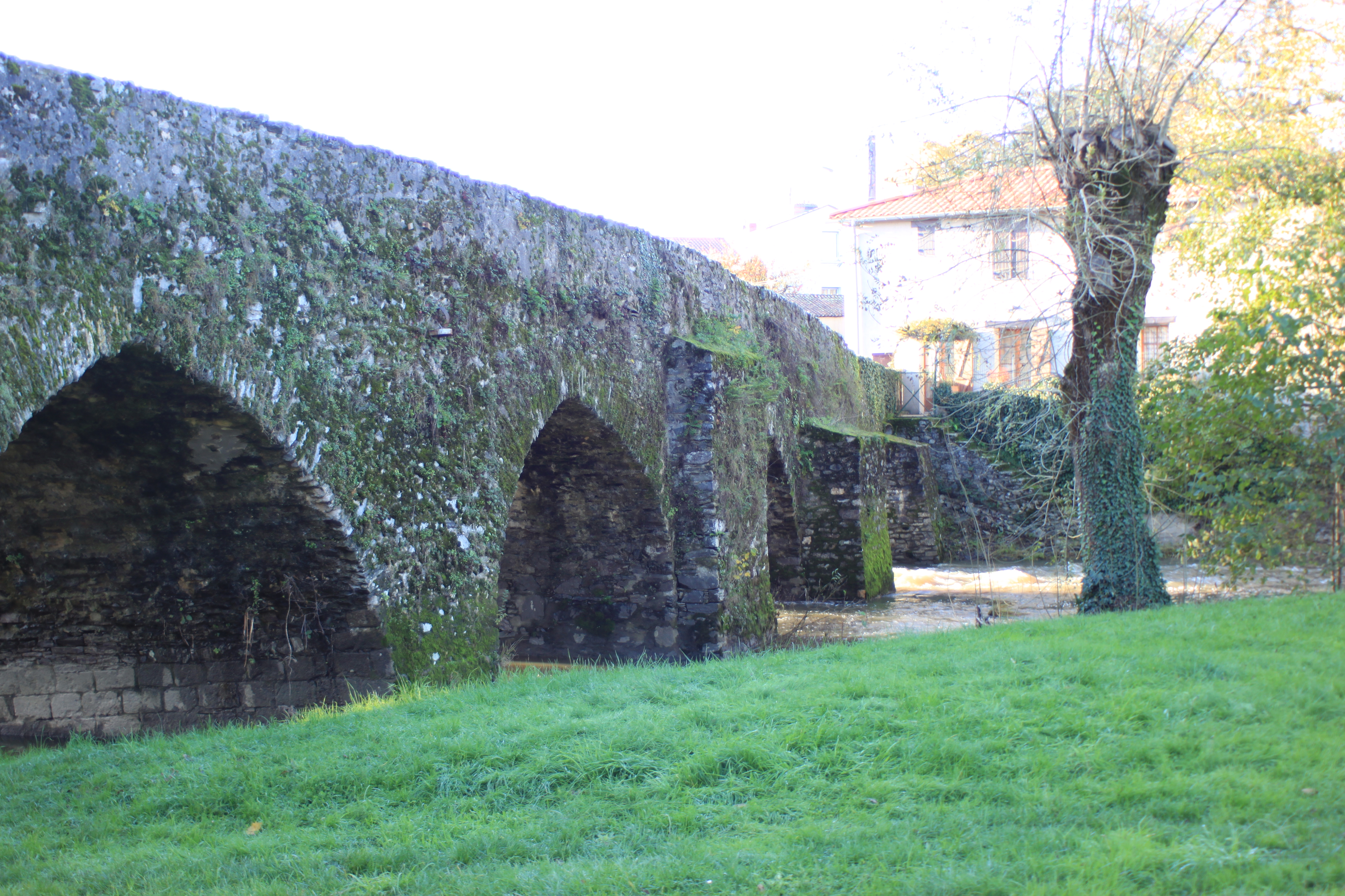 Pont de Bohardy, Fr-49-Montrevault.